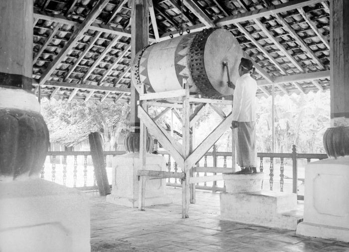 Negatif. Panggilan shalat menggunakan bedug di masjid, Banten. Pada sekitar tahun 1600 Banten ("Bantam") adalah kesultanan dagang yang kuat, tetapi memasuki abad ke-17 mulai tersaingi oleh kerajaan Mataram dari Jawa Tengah di masa Sultan Agung. Pasukan Sultan Agung dua kali, tahun 1628 dan 1629, mencoba menaklukkan benteng VOC di Batavia, dan gagal. Kegagalan ini terutama disebabkan oleh pasokan logistik yang buruk serta merebaknya wabah penyakit di pihaknya. Bangunan kerajaan Banten hampir tak tersisa sekarang, tetapi masjidnya masih berdiri. (P. Boomgaard, 2001).